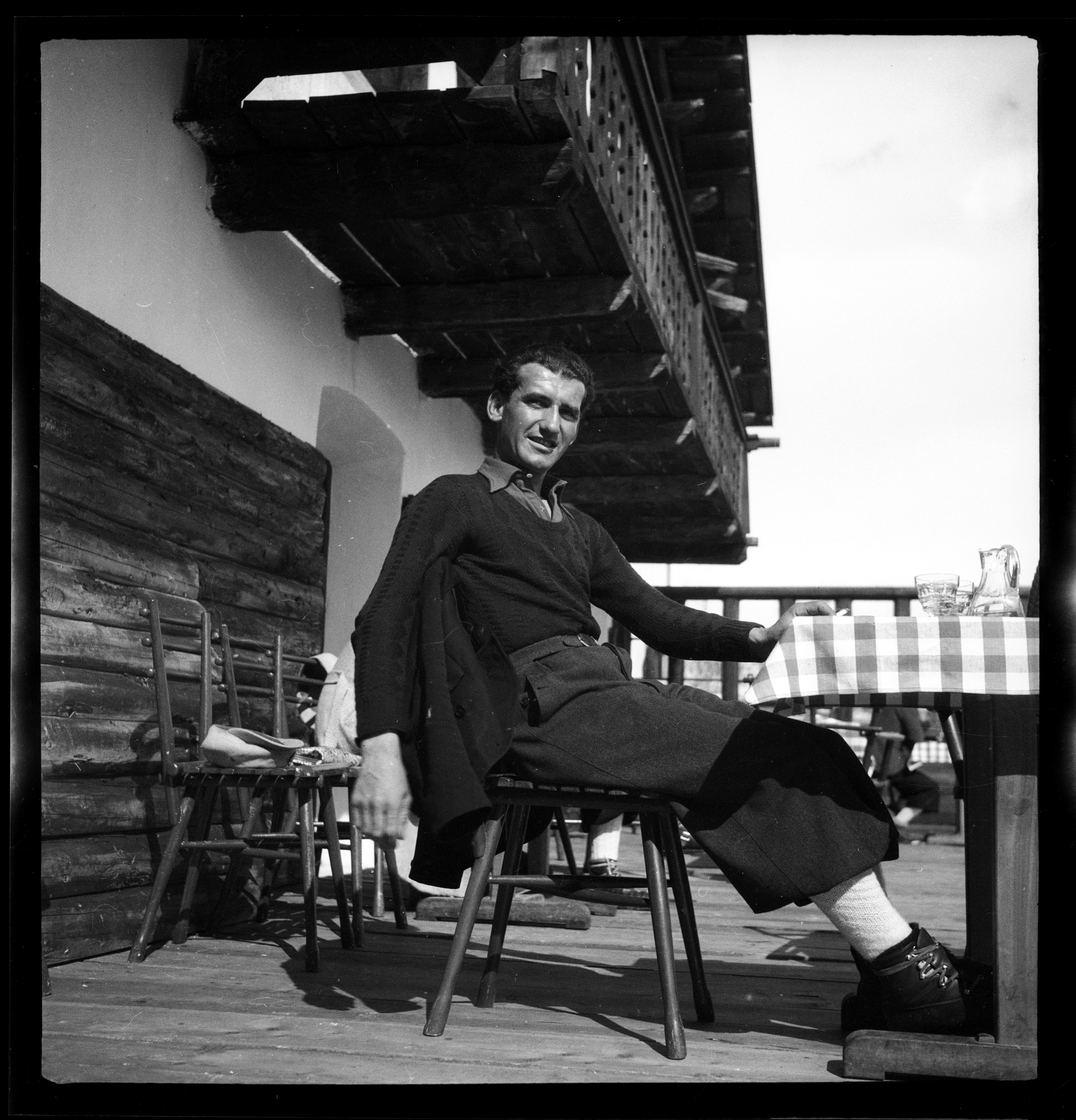 Schweiz, St. Moritz: Menschen; Rudolf (Rudi) Rominger (Skirennfahrer); St. Moritz